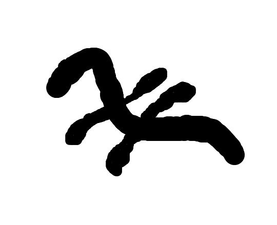 Reconstrucción personal sobre el tamga original del clan de los Ashina.